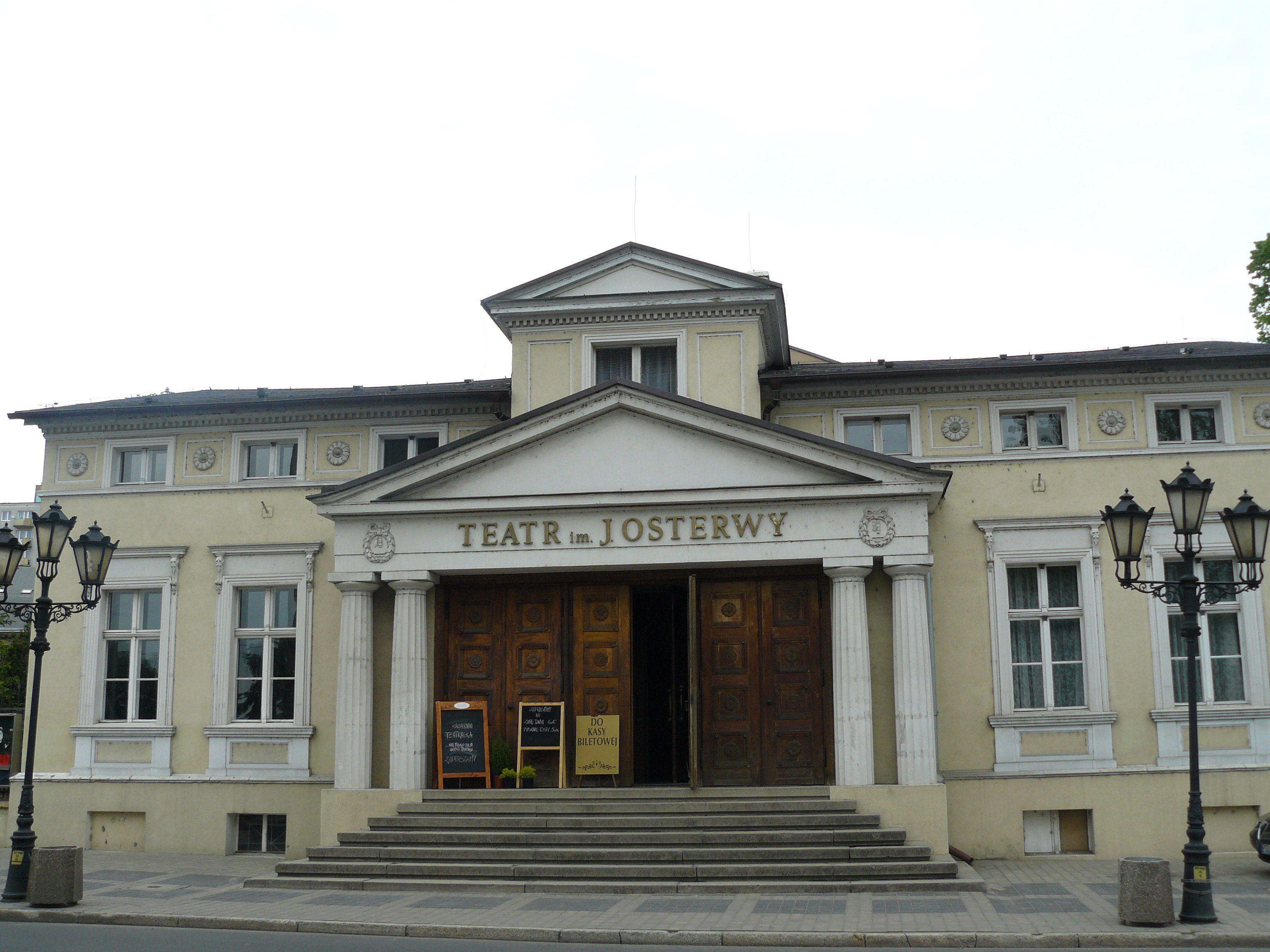 Teatr im. Juliusza Osterwy